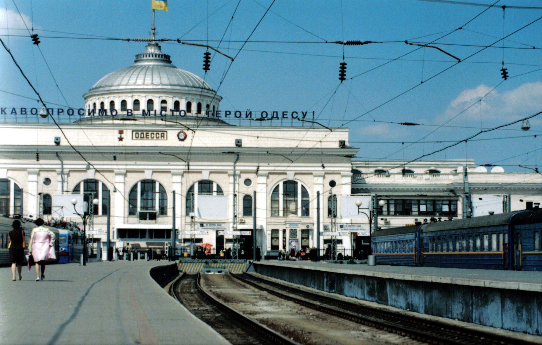 Odessa Ukraine Train Station